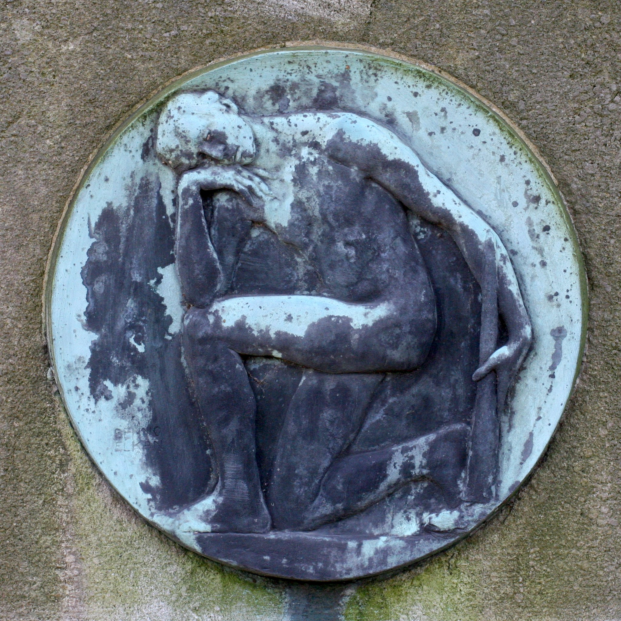 Kniender Mann mit erloschener Fackel von Benno Elkan, 1910. Grabmal auf dem Ostenfriedhof in Dortmund